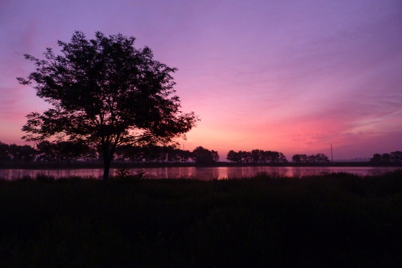 Село Великовечное, Белореченский район This image is related to the protected area of Russia number 2320057